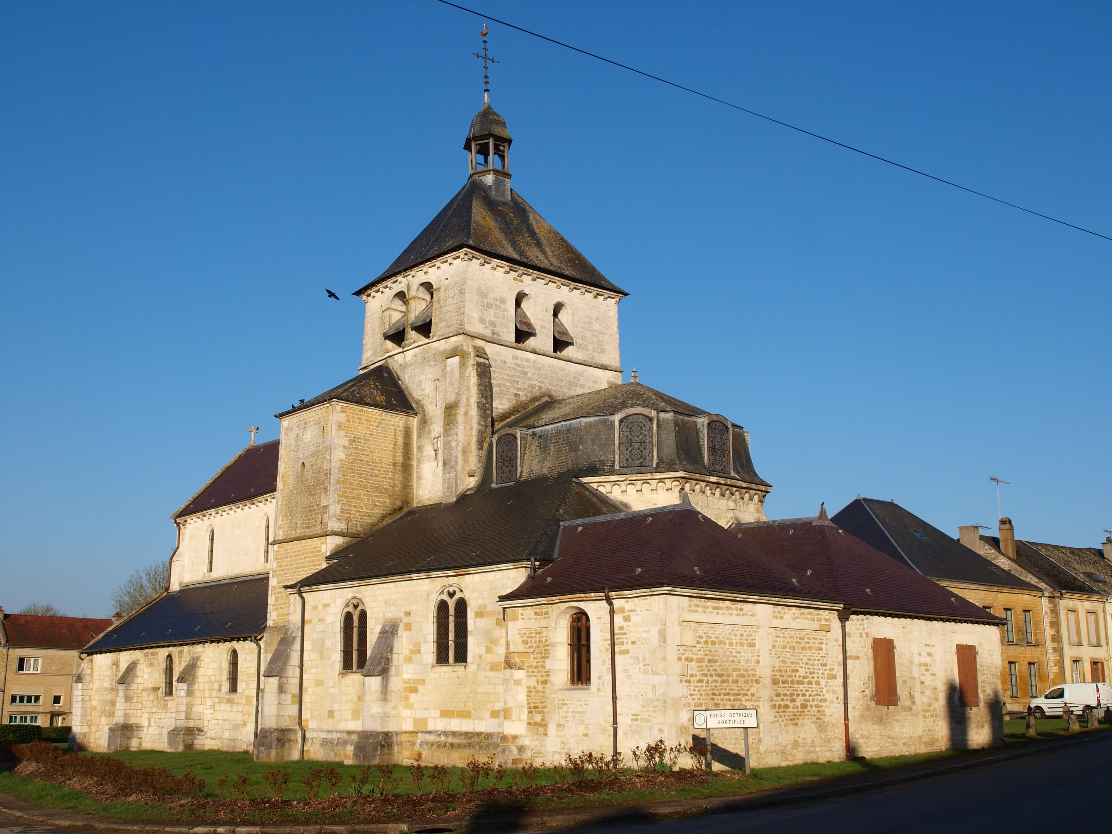 Église Saint-Martin de Vendresse (Ardennes, France)